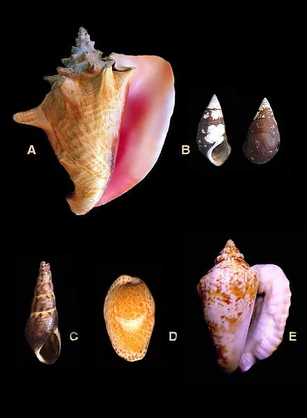 Fotos de Moluscos del estado Falcón - Venezuela A. Strombus gigas B. Pachychilus laevisimus C. Melanoides tuberculata D. Cypraea spurca acicularis E: Strombus raninus